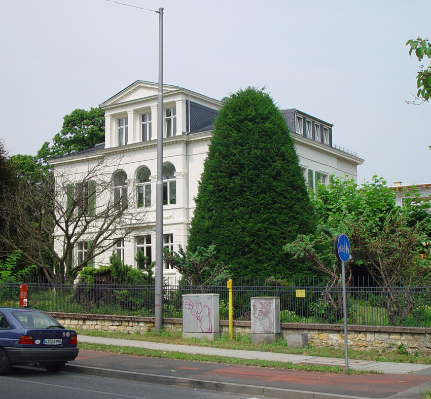 Villa Ludwig Beck selbst aufgenommen